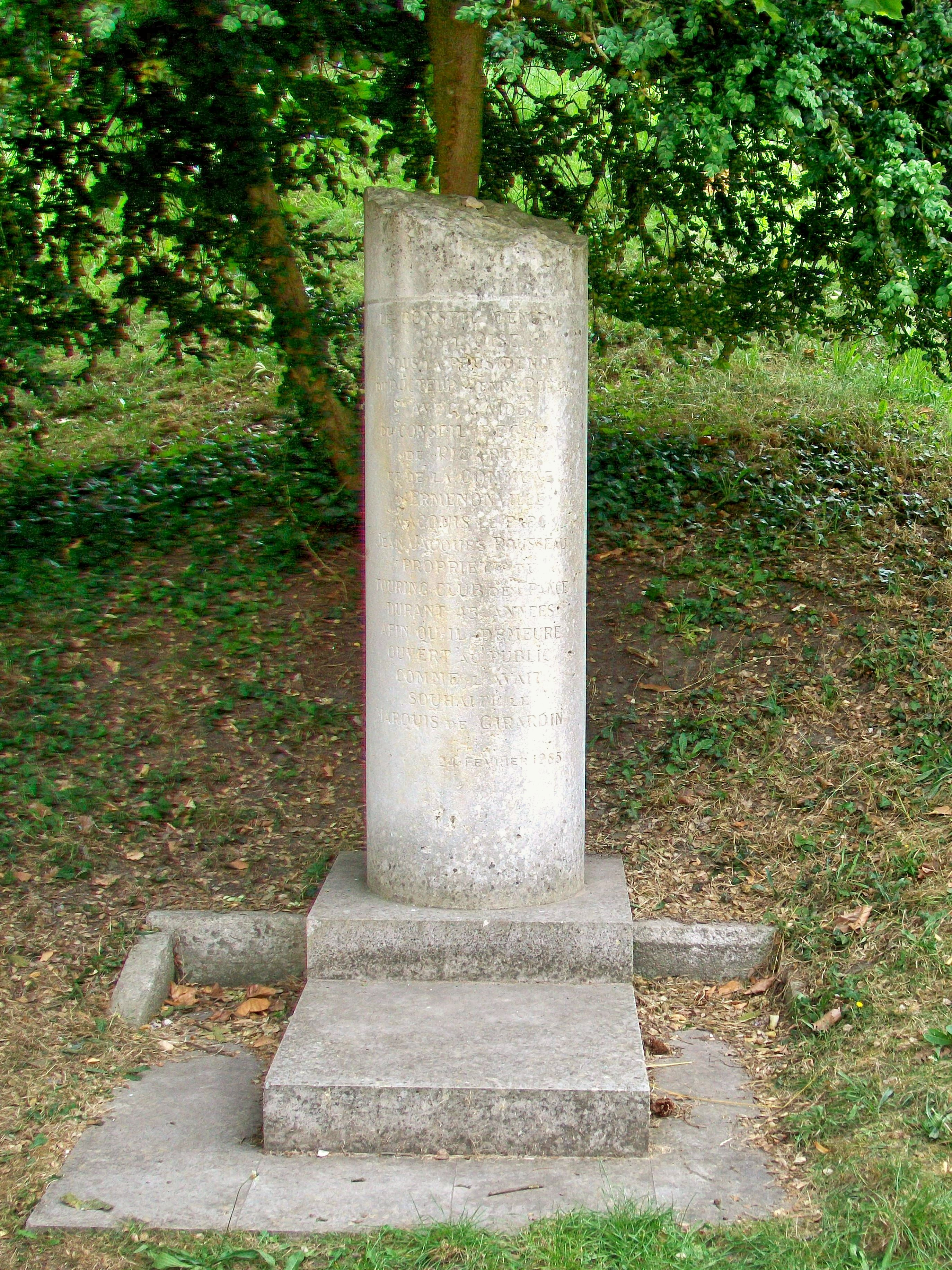 La borne à l'entrée, qui rappelle l'acquisition du parc par le Conseil général de l'Oise pour une durée de 45 ans, en 1985.